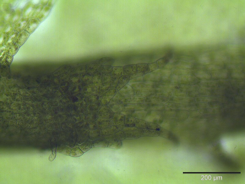 Bleiches Lippenbechermoos (Chiloscyphus pallescens), Unterblatt, Vergrößerung: 125x